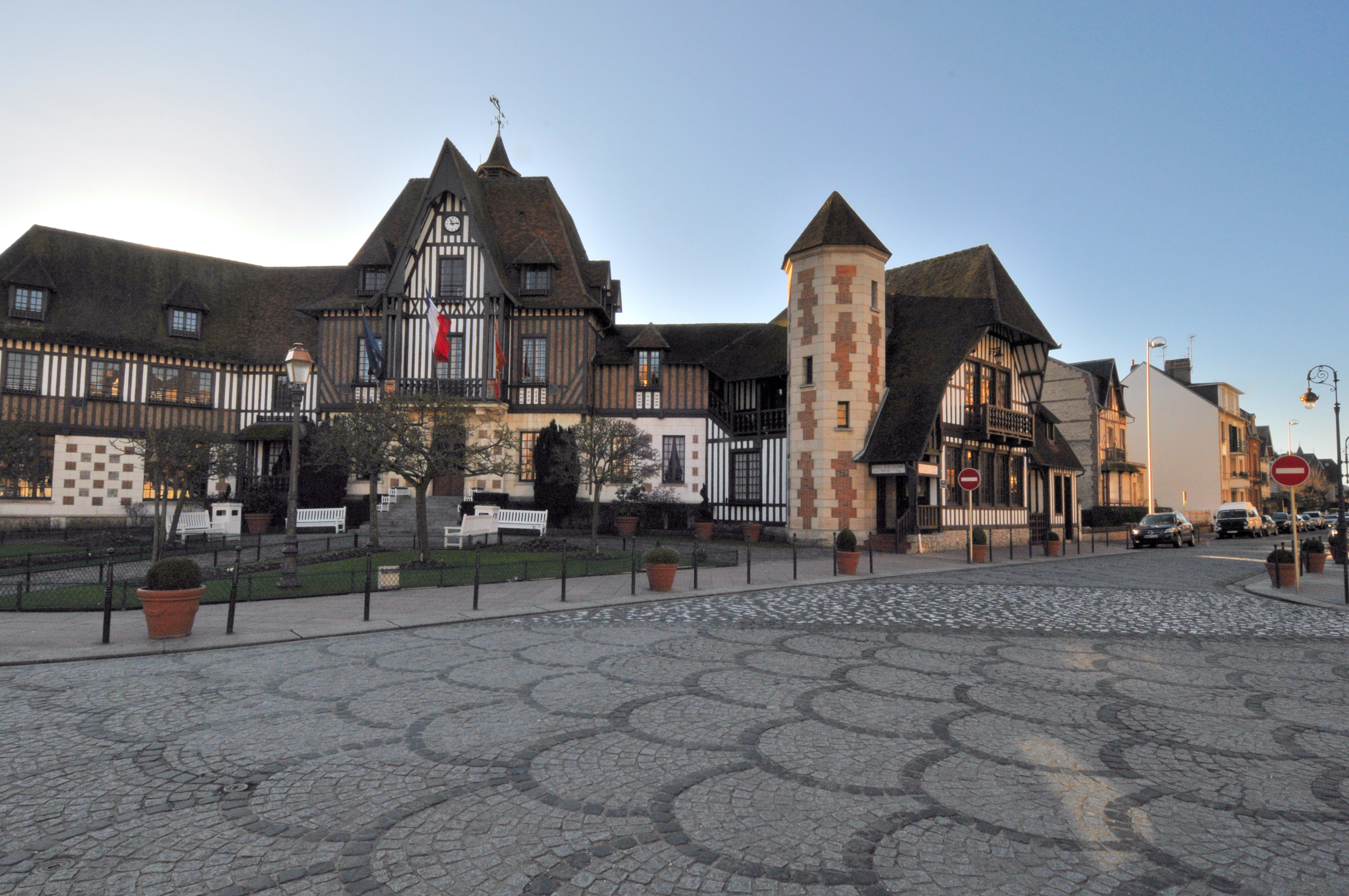 hôtel de ville de Deauville, Calvados, France.